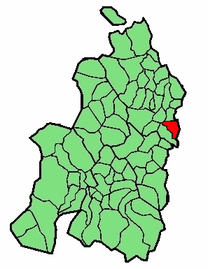 aipaturiko udalerriaren kokapena Nafarroa Beherean